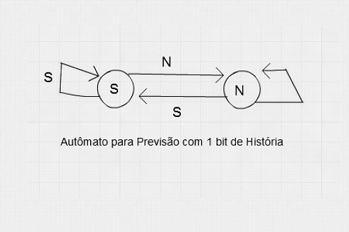 autômato para desvio de um bit